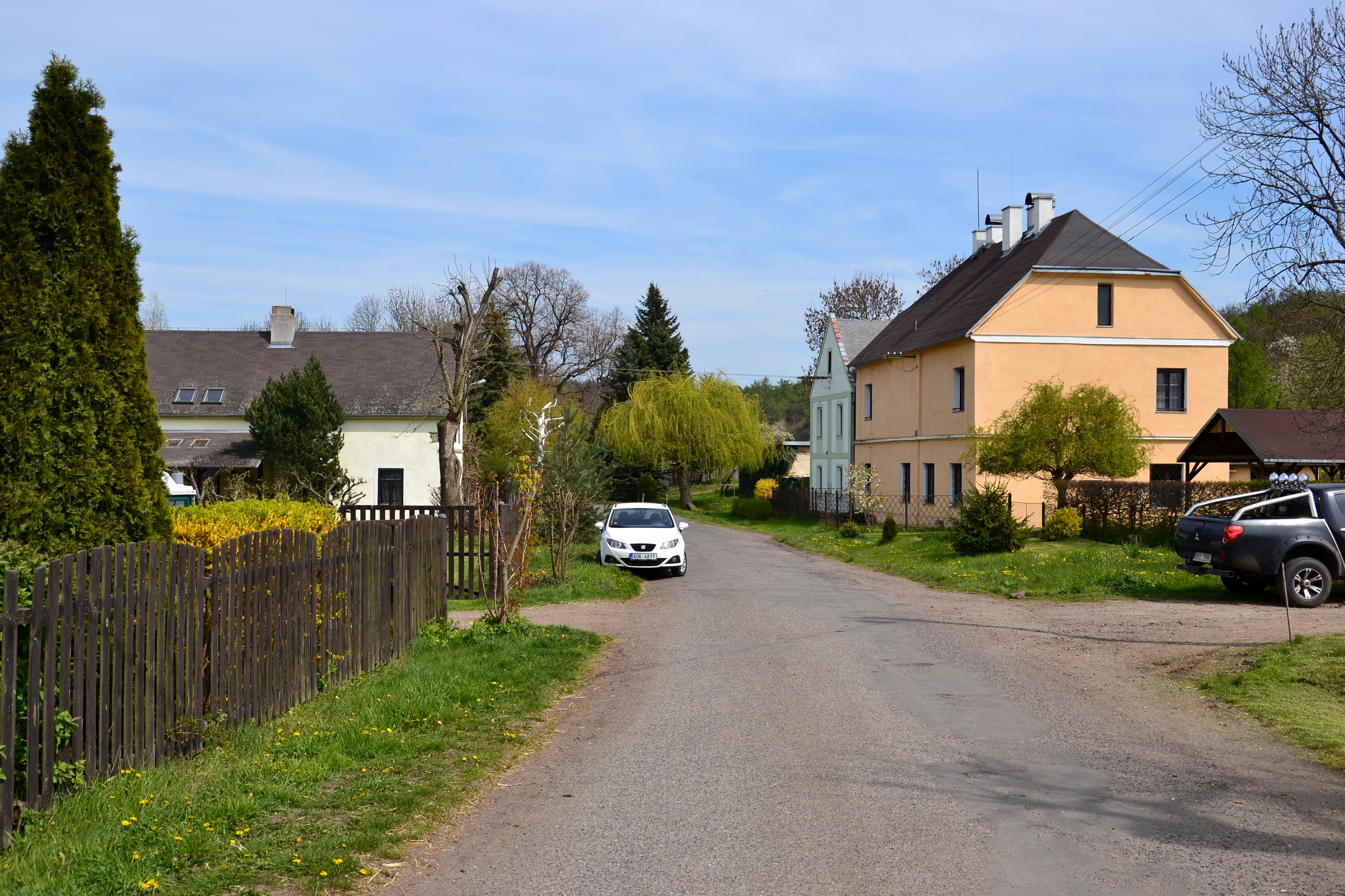 Vojnín – dům čp. 3